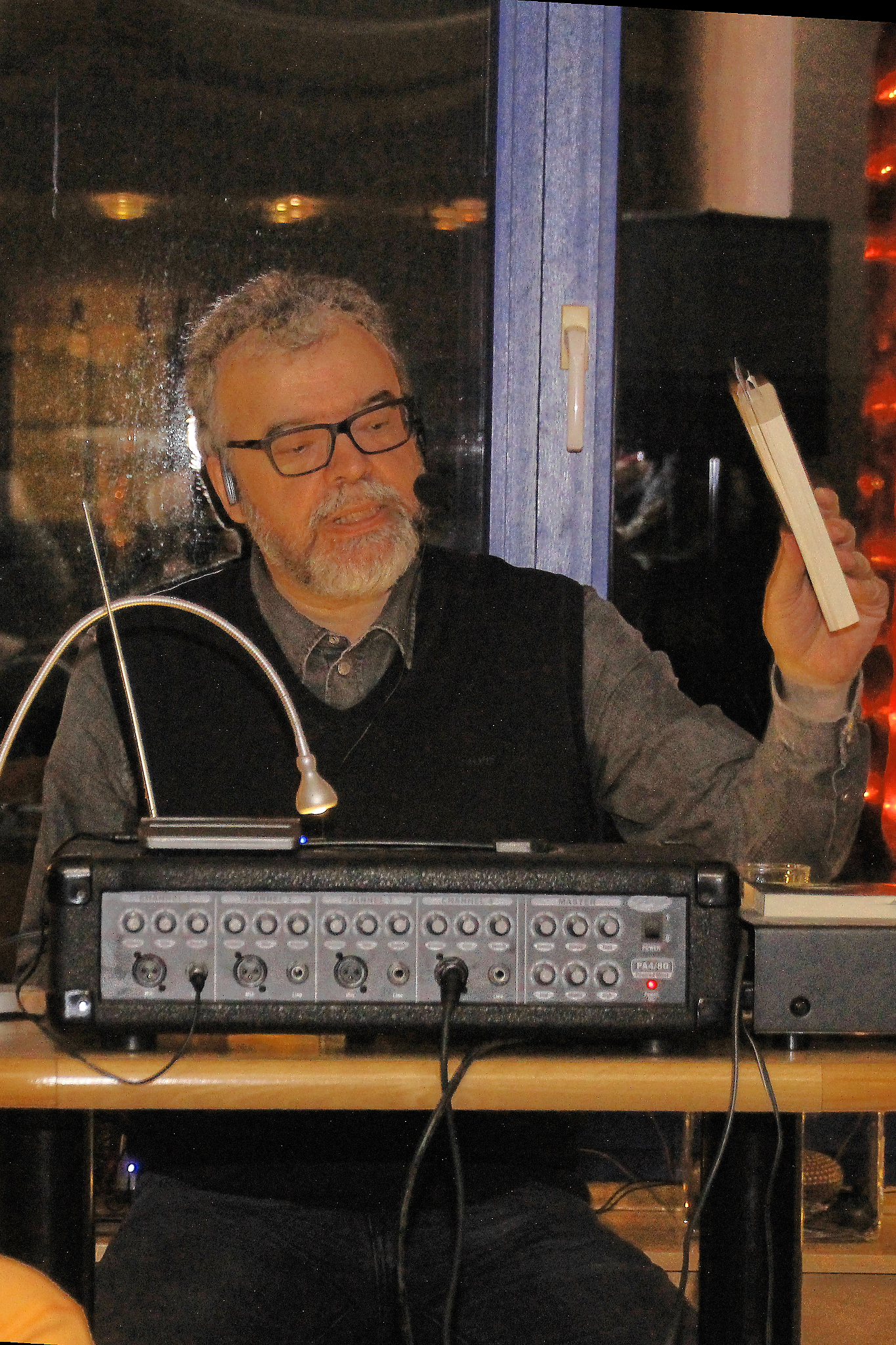 Autor Franjo Terhart bei der Lesung seines Buches "Die Mithrasmorde von Moers" in Krefeld